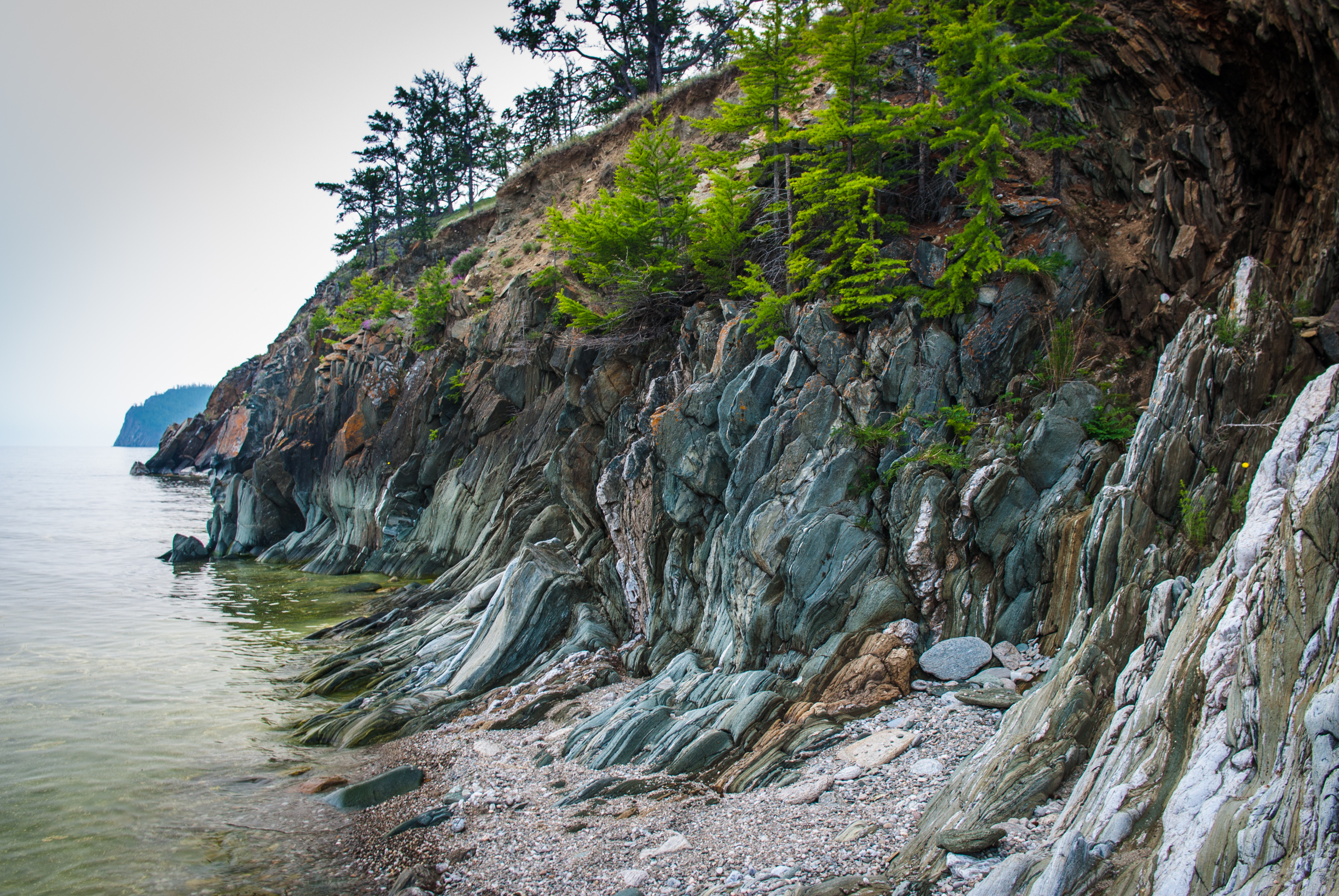 Прибайкальский: Территория парка в виде узкой полосы охватывает большую часть (около 470 км) западного побережья озера Байкал - от п. Култук на юге до мыса Кочериковского на севере. Можно сказать, что это самый "протяженный" из национальных парков России. Он занимает восточные склоны Приморского хребта, южную часть Олхинского плато, бассейн р. Большая Речка (впадает в р. Ангару), а также о. Ольхон. Южная часть парка рассечена вытекающей из Байкала могучей Ангарой.,Иркутский район, Иркутская область This image is related to the protected area of Russia number 3800118